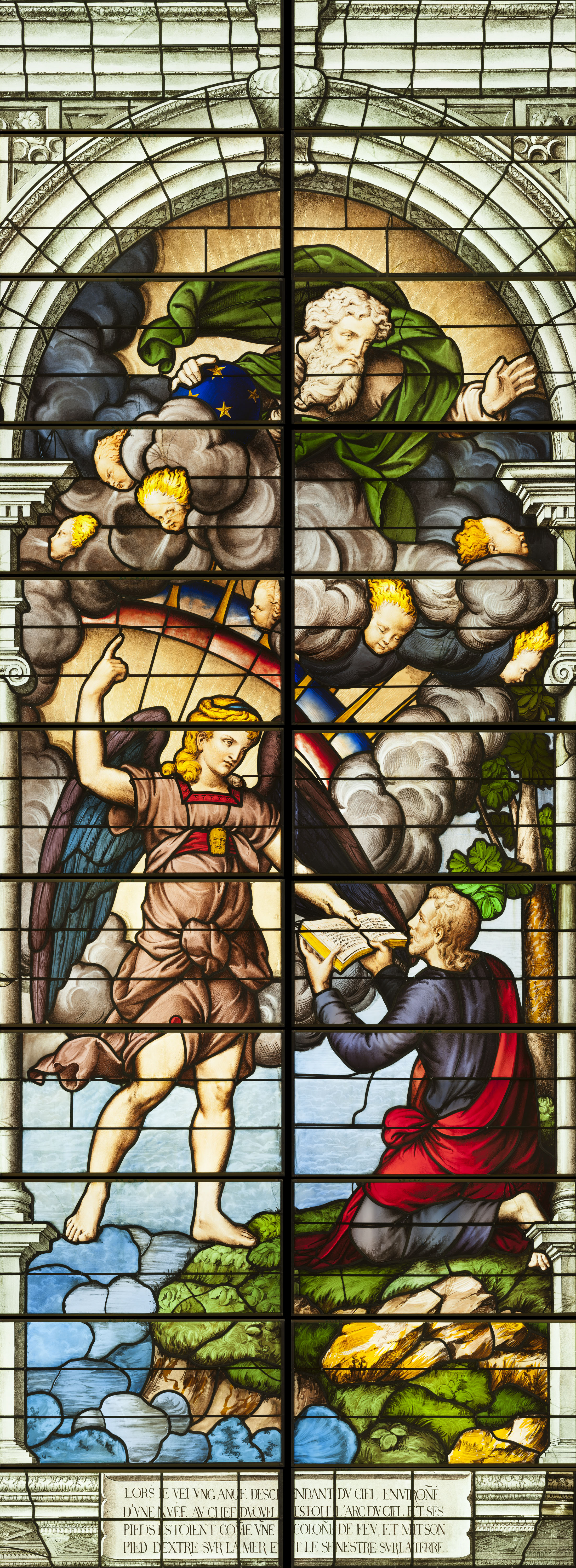 Panneau du registre supérieur de la baie 3 de l'abside.